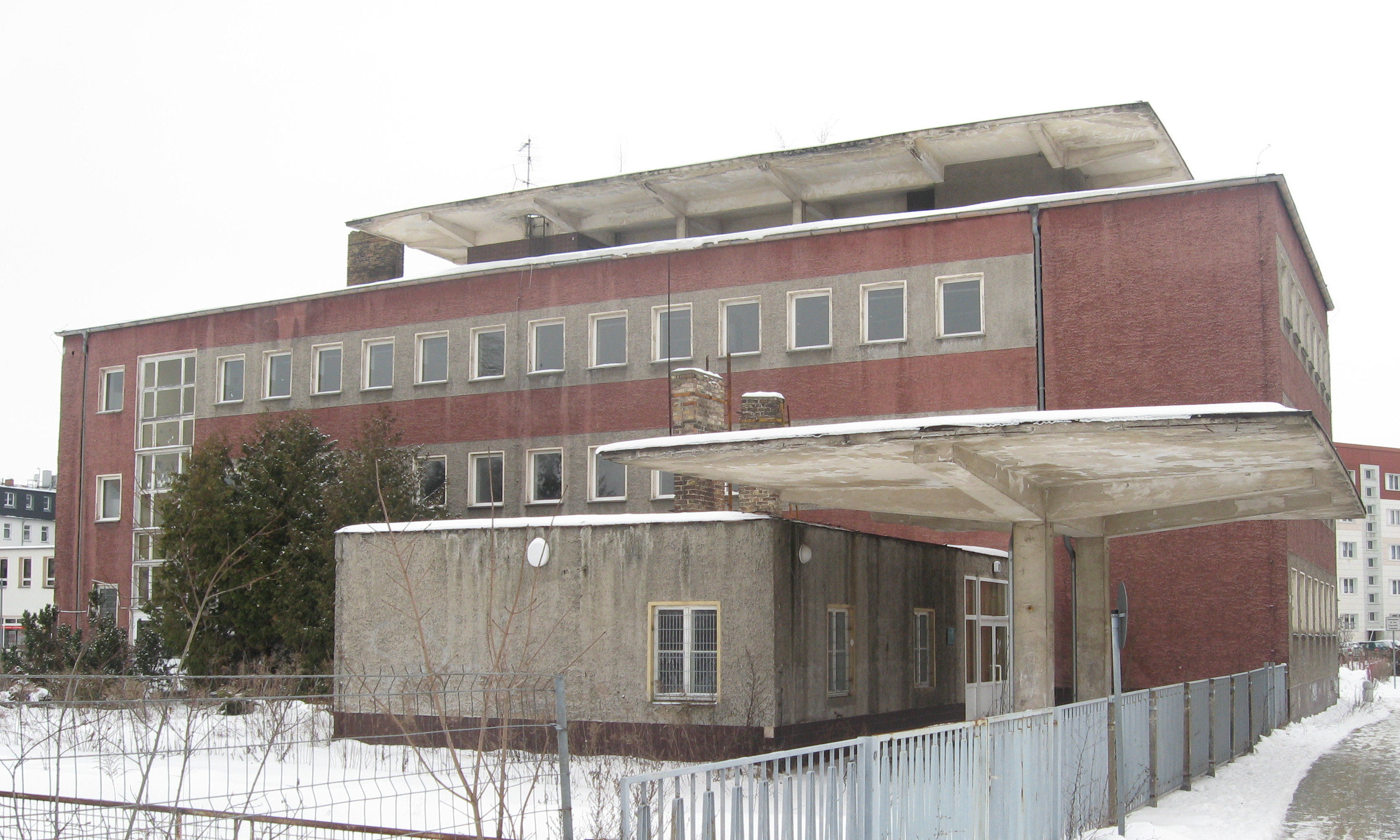 unter Denkmalschutz stehende Gebäude in Oranienburg, Rungestraße 17